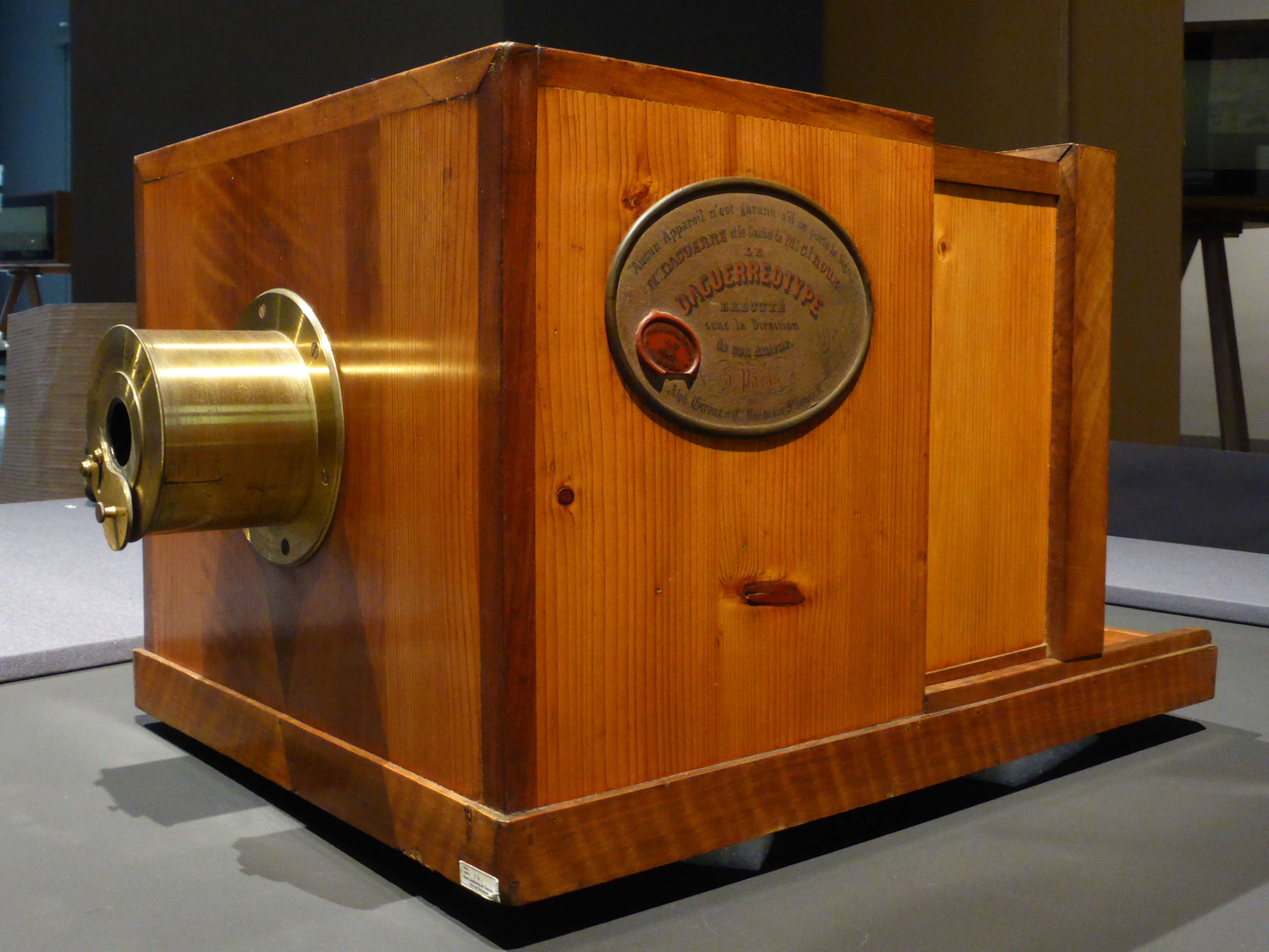 Cámara fotográfica original de 1839 (el año en que Daguerre anunció el primer procedimiento fotográfico). Fue construida por Alph. Giroux, en París, con el número 178 de fabricación. Se conserva en la Real Academia de Ciencias y Artes de Barcelona, o "Reial Acadèmia de Ciències i Arts de Barcelona", (RACAB), número de registro 14. Con esta cámara se obtuvieron las primeras vistas al daguerrotipo en Barcelona, el 10 de noviembre de 1839. En la Península Ibérica, el mes anterior, en octubre de 1839, ya se obtuvo un primer daguerrotipo en Lisboa, por tripulantes de la fragata Oriental.